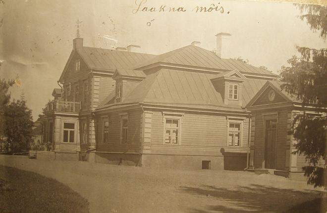 Laagna mõis